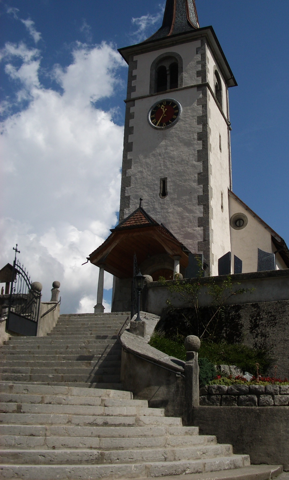 Lessoc, Switzerland self-made, August 2005